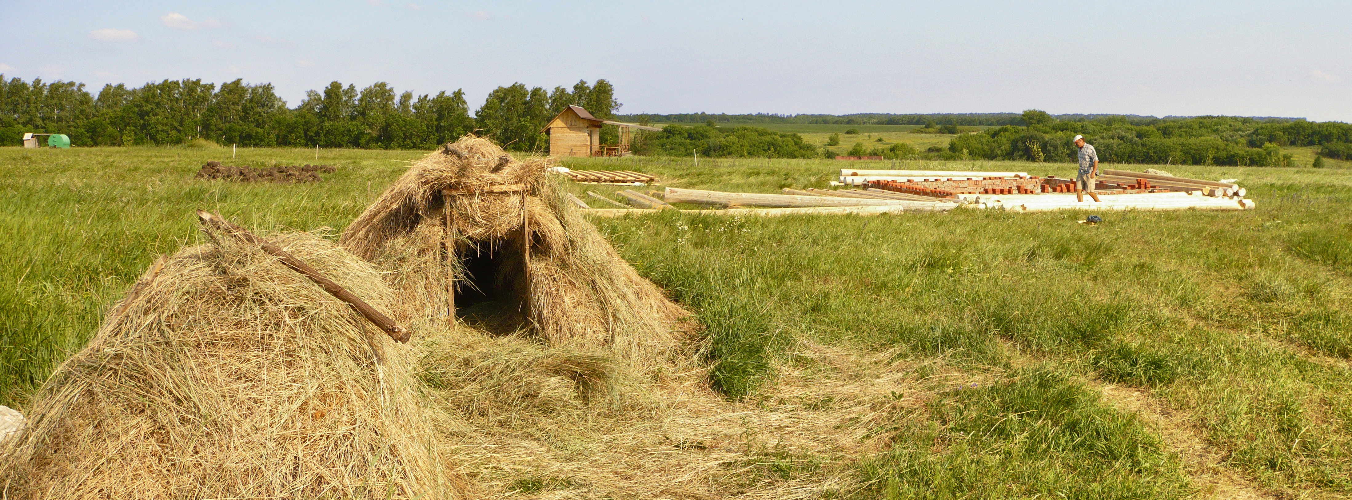 Шалаш из сена (пырей), внешний вид. Село Устинка, Белгородского района. 2009.